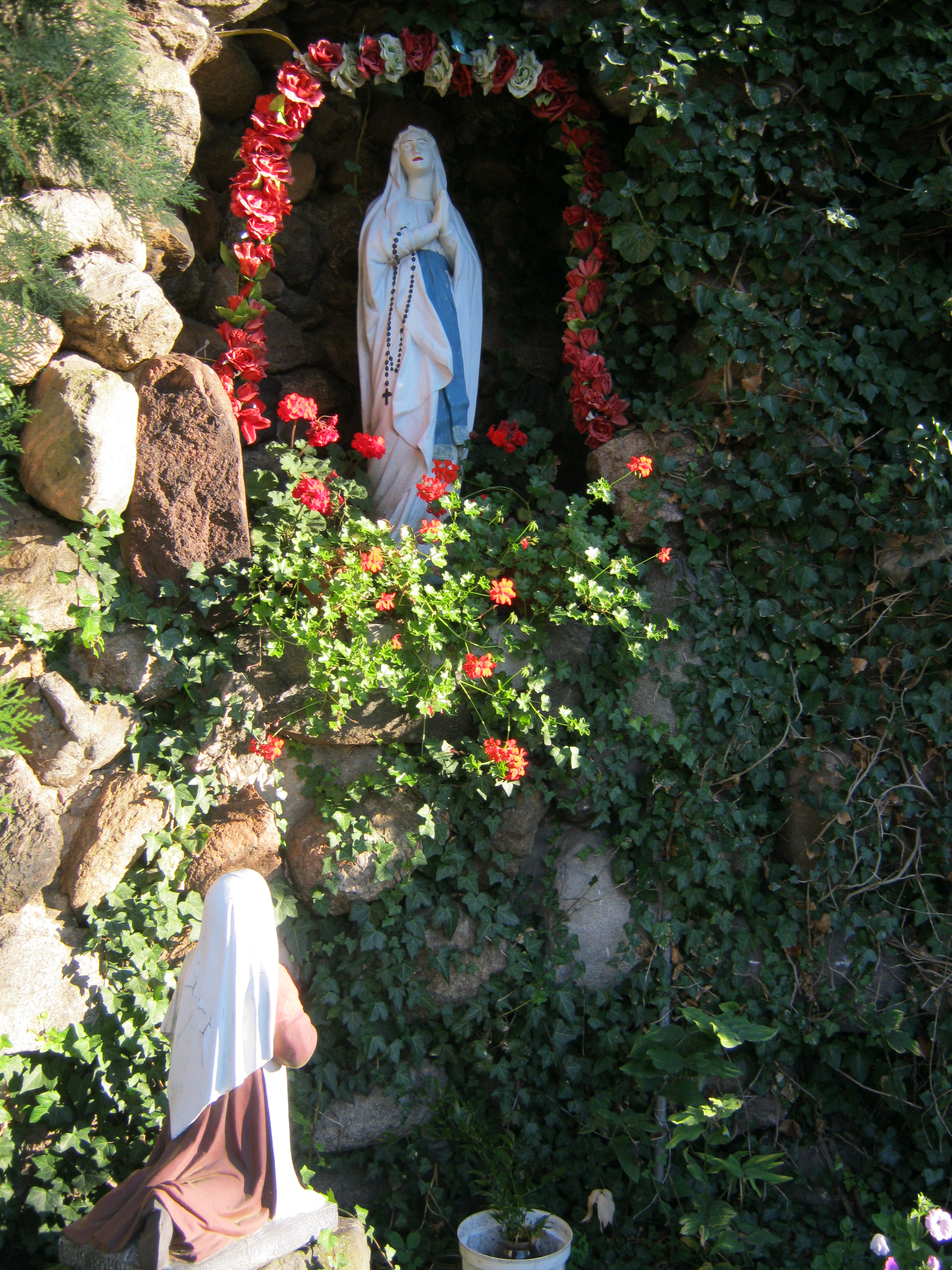 Grota NMP z Lourdes w Kamionce od zachodniej strony.